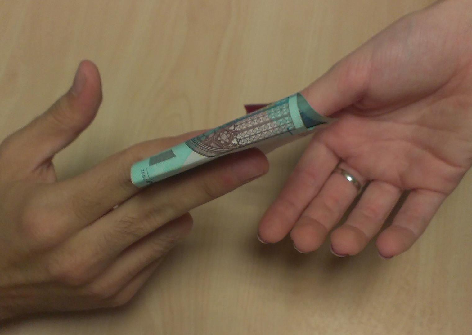 Simbolična slika poslovnih navad.